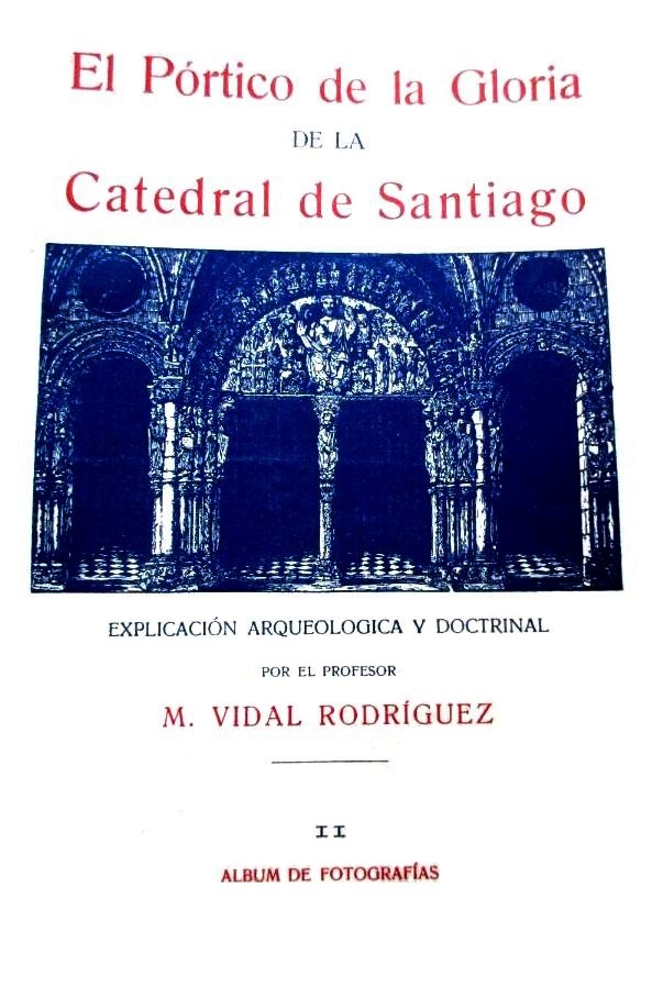 El Pórtico de la Gloria de la Catedral de Santiago. Explicación arqueológica y doctrinal por el profesor Manuel Vidal Rodríguez, vol. II, álbum de fotografías